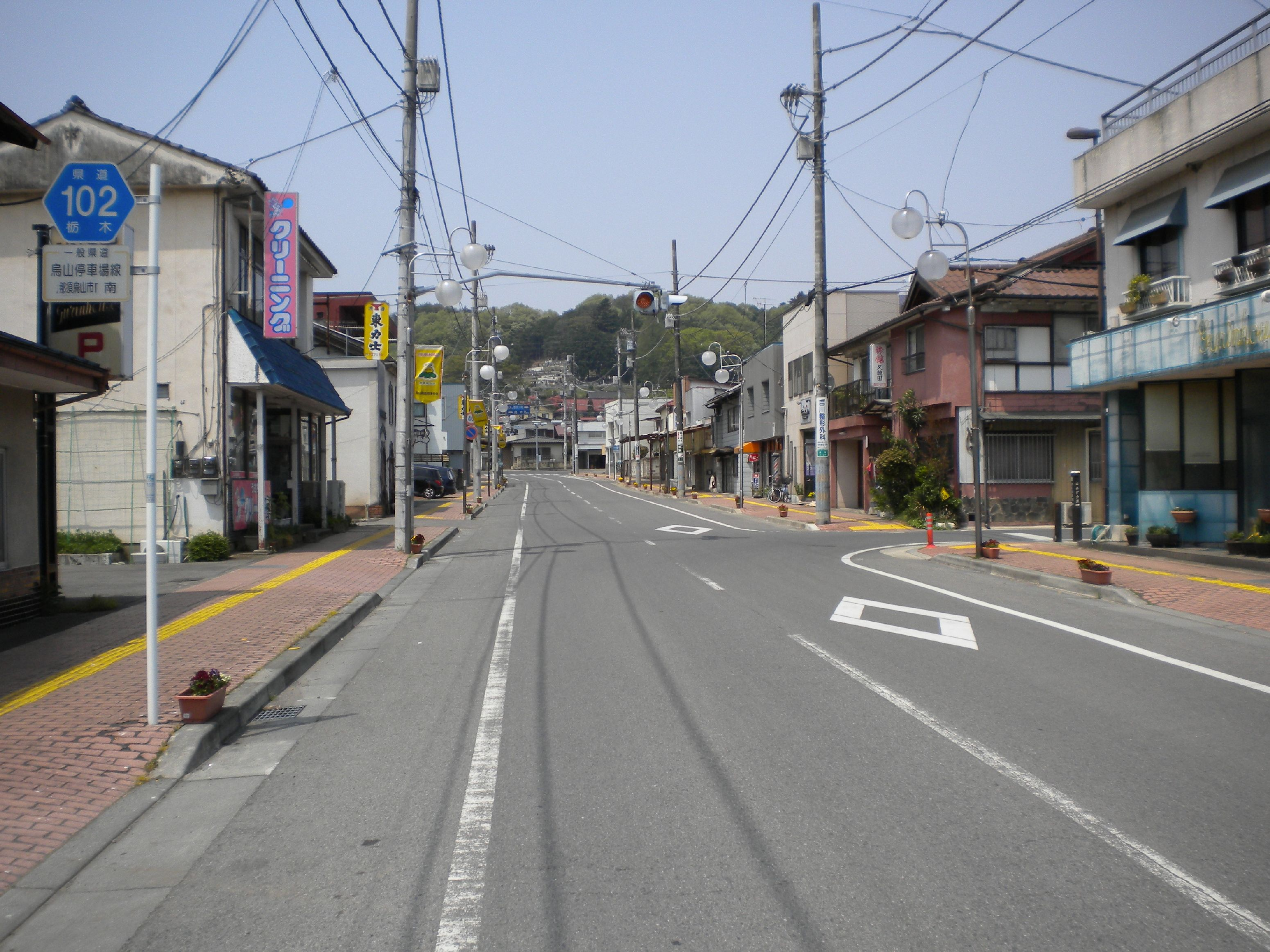 栃木県道102号烏山停車場線 栃木県那須烏山市南2丁目